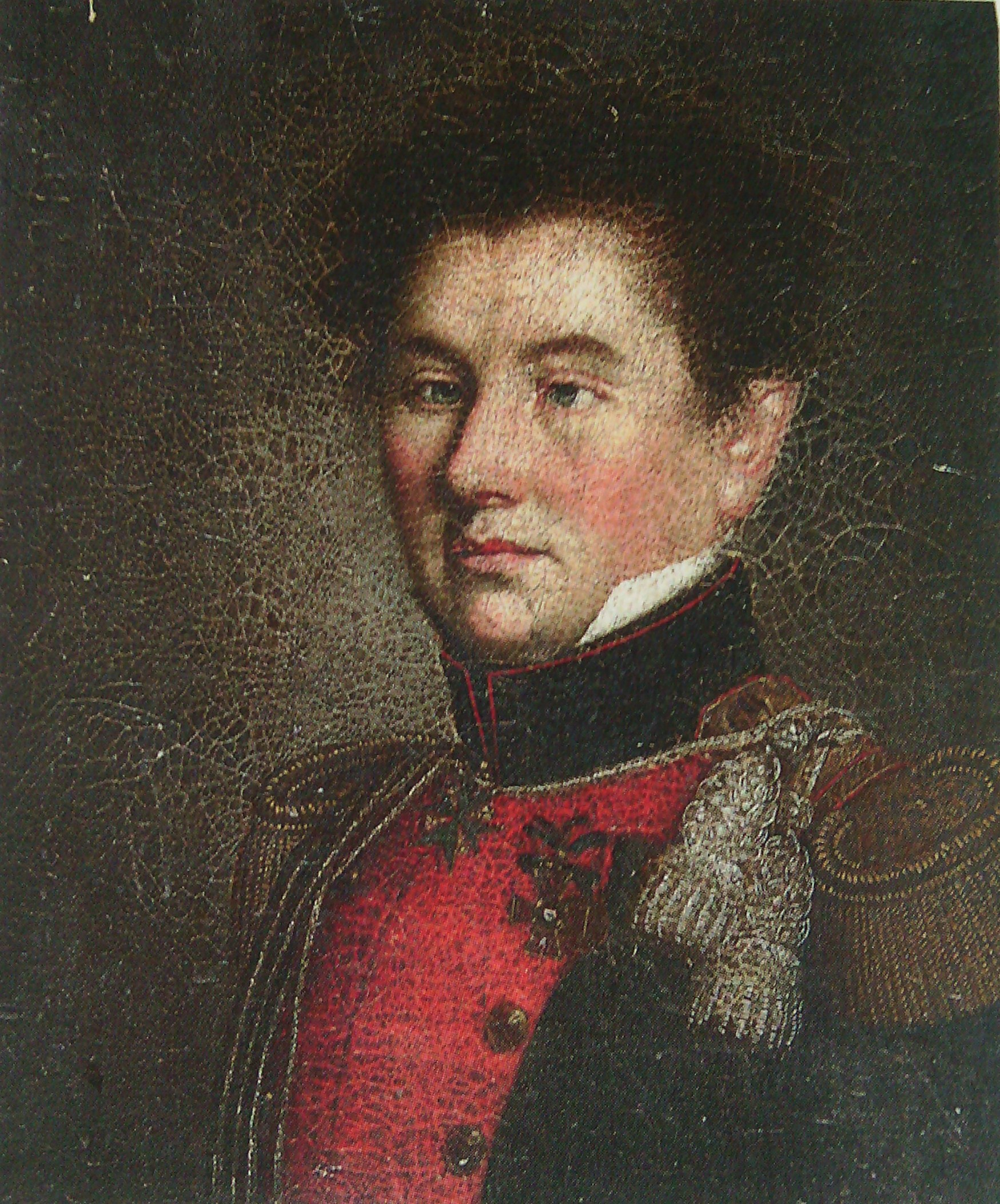 Князь Николай Петрович Оболенский (1790—1847)